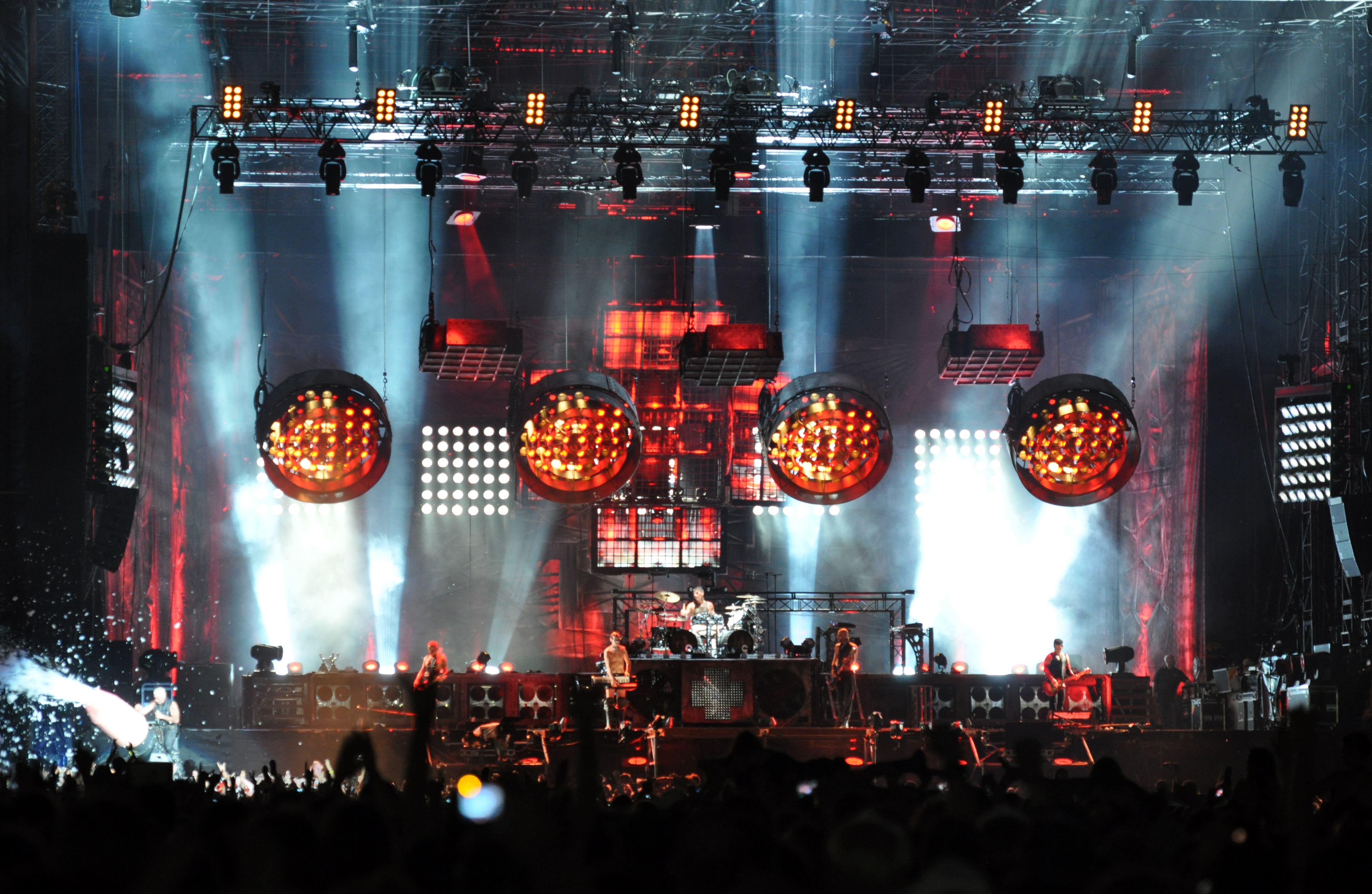 Rammstein at Wacken Open Air 2013